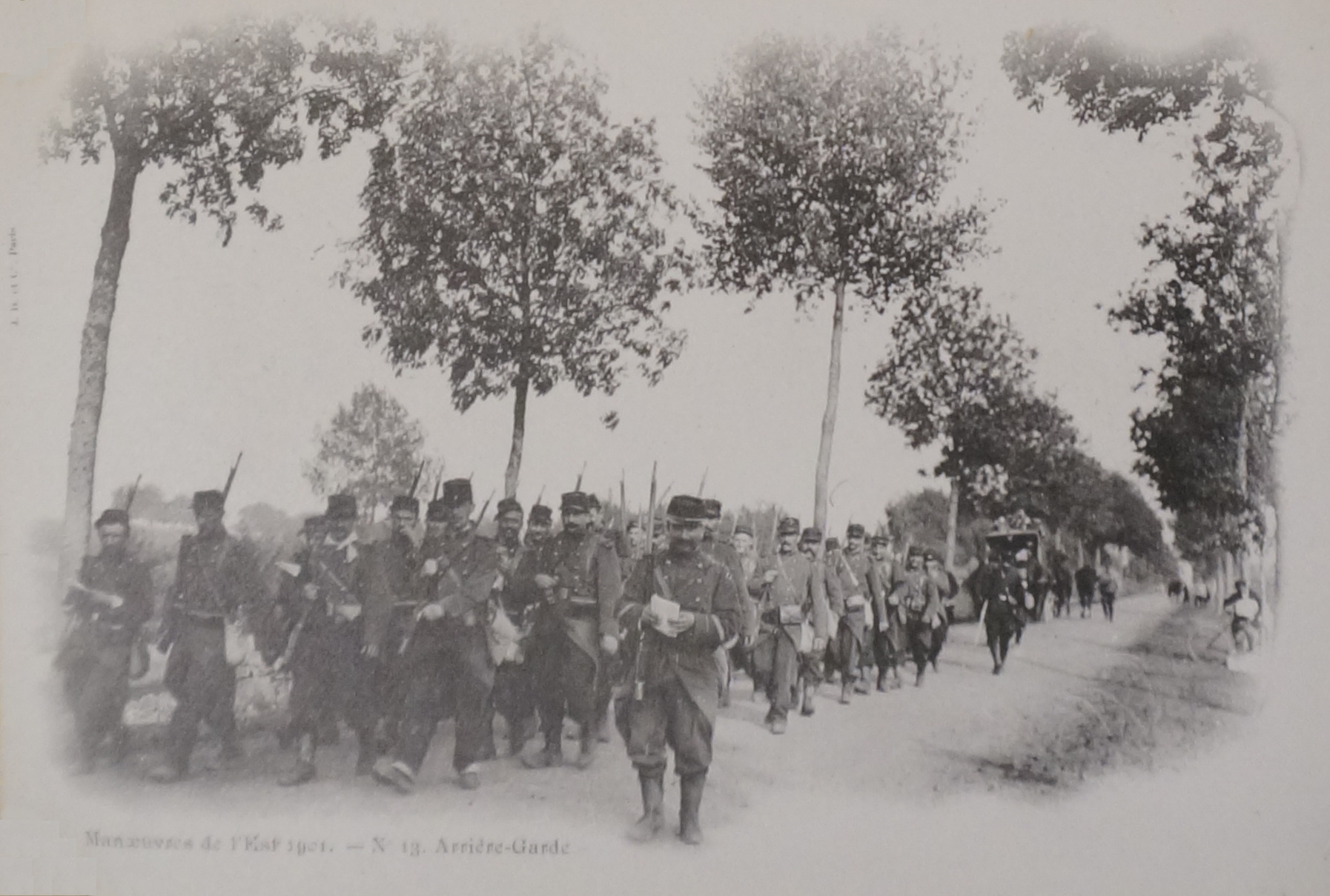 lors des Grandes maoeuvrves de l'est de 1901. BM Reims cote CPA t4. Publication de 1901 en cartes postales.